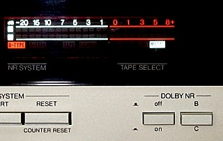 Aussteuerungsanzeige des Kassettendecks Denon DR-M 11 aus den 1980er Jahren